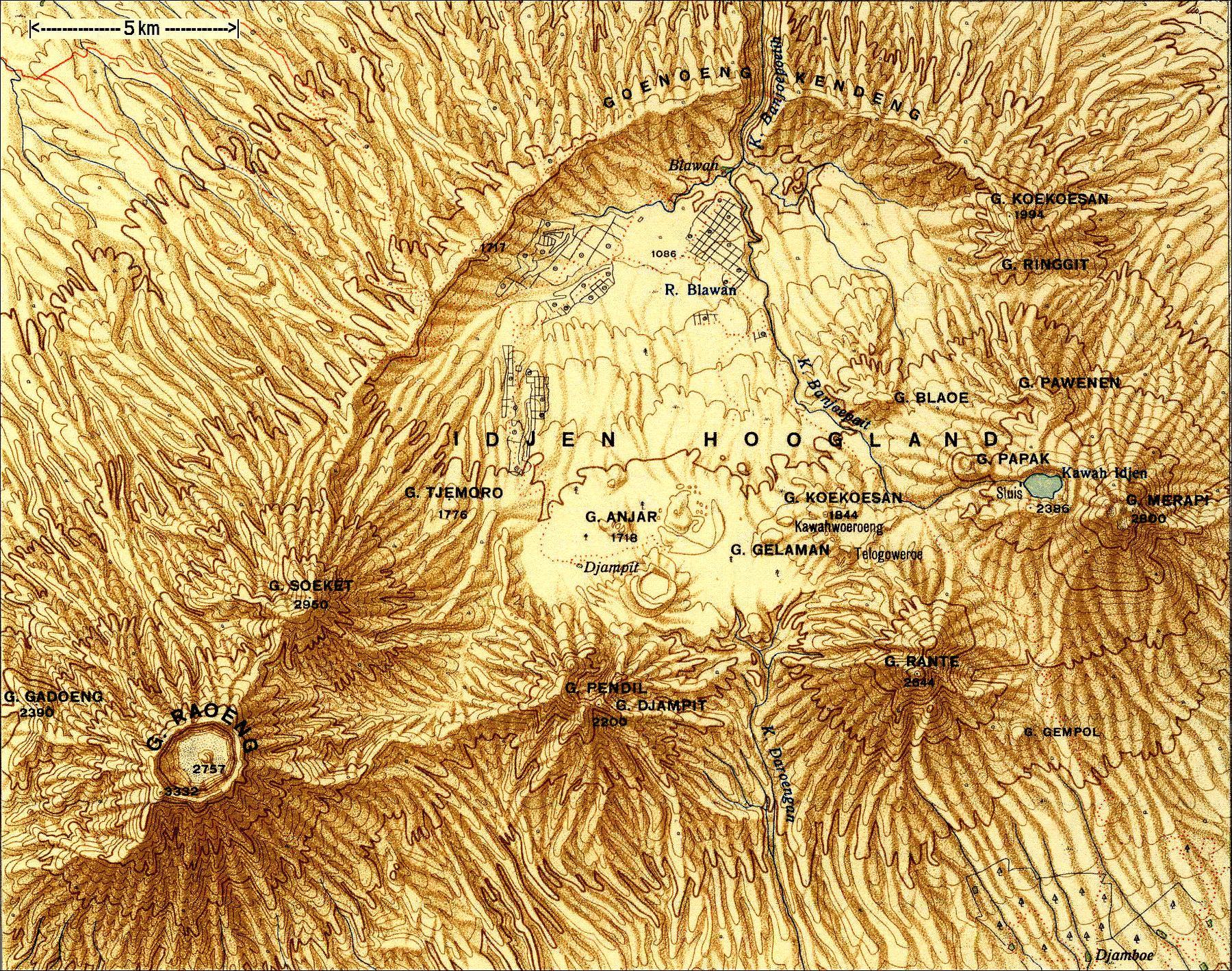 Ijen-Gebirge